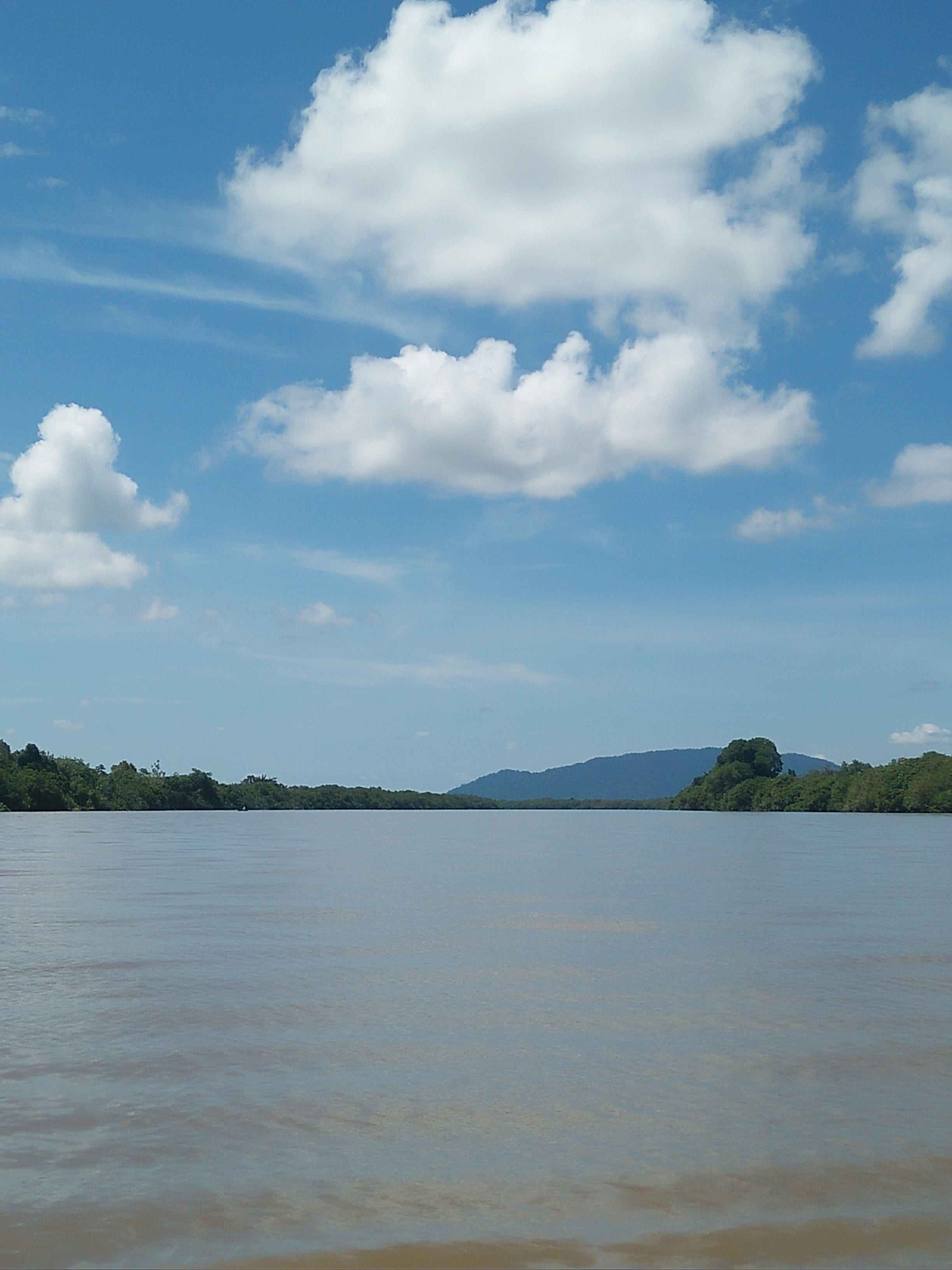 Sungai Sambas, difoto dari tengah sampan, Kalimantan Barat.